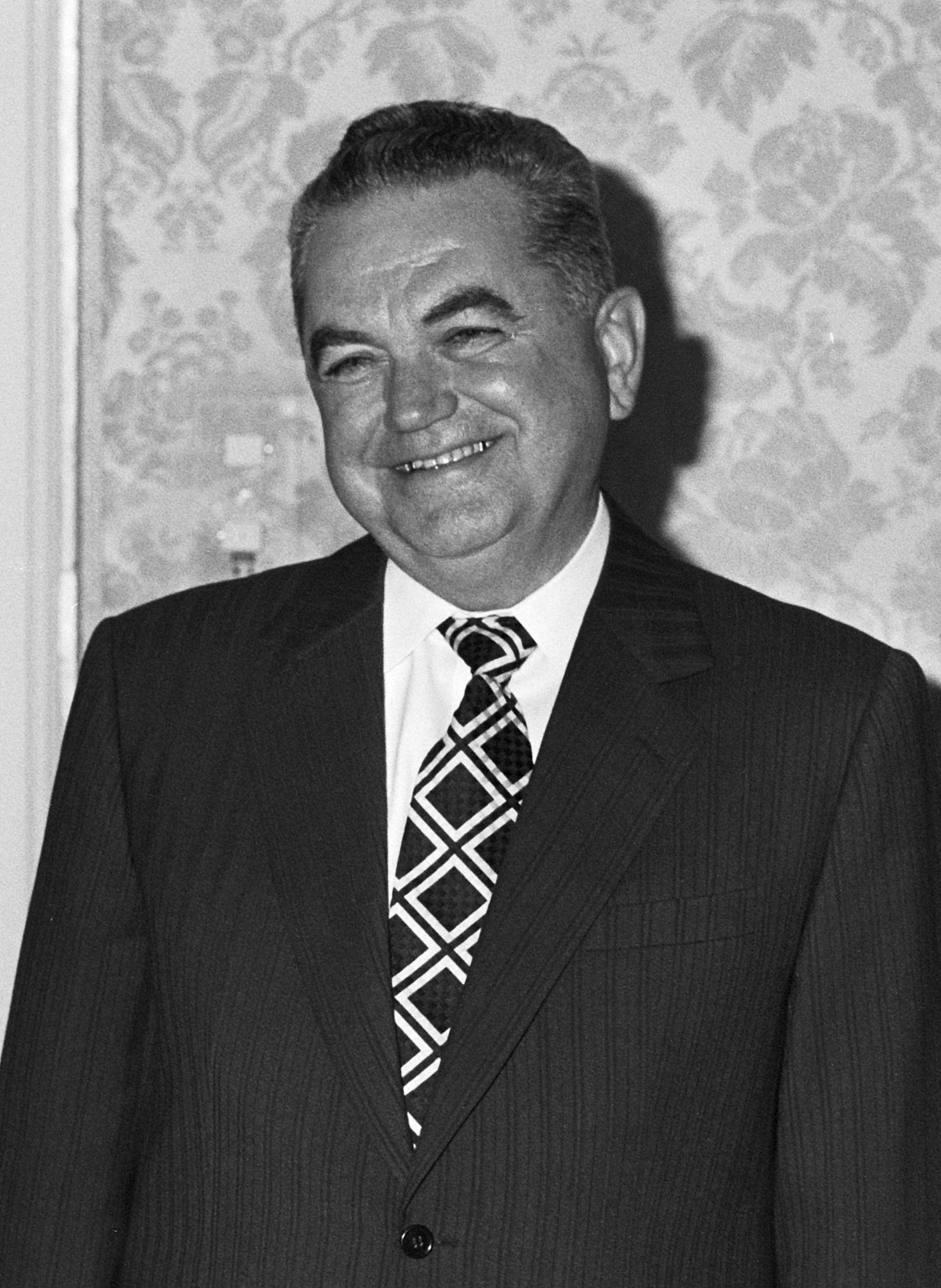 Koningin Beatrix ontvangt Roemeense premier Dascalescu